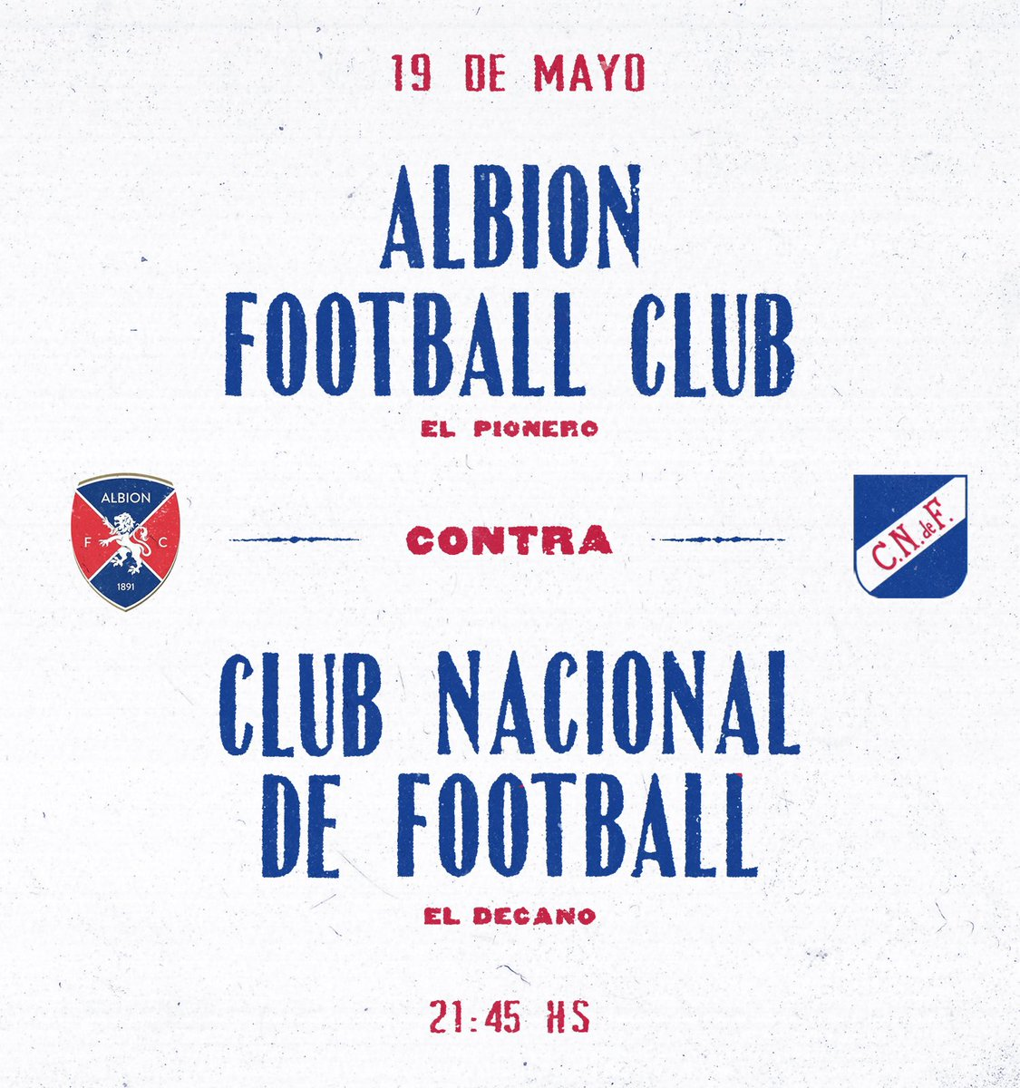 Afiche de un partido amistoso entre Albion y Nacional, disputado en 2020.